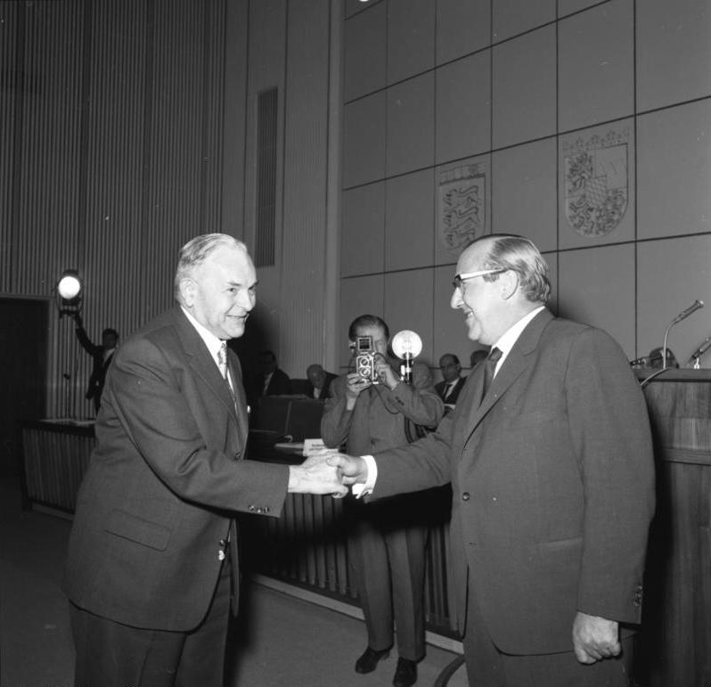 Wahl des bayrischen Min. Präsidenten Ehard zum Bundesratspräsidenten Deutscher Bundesrat